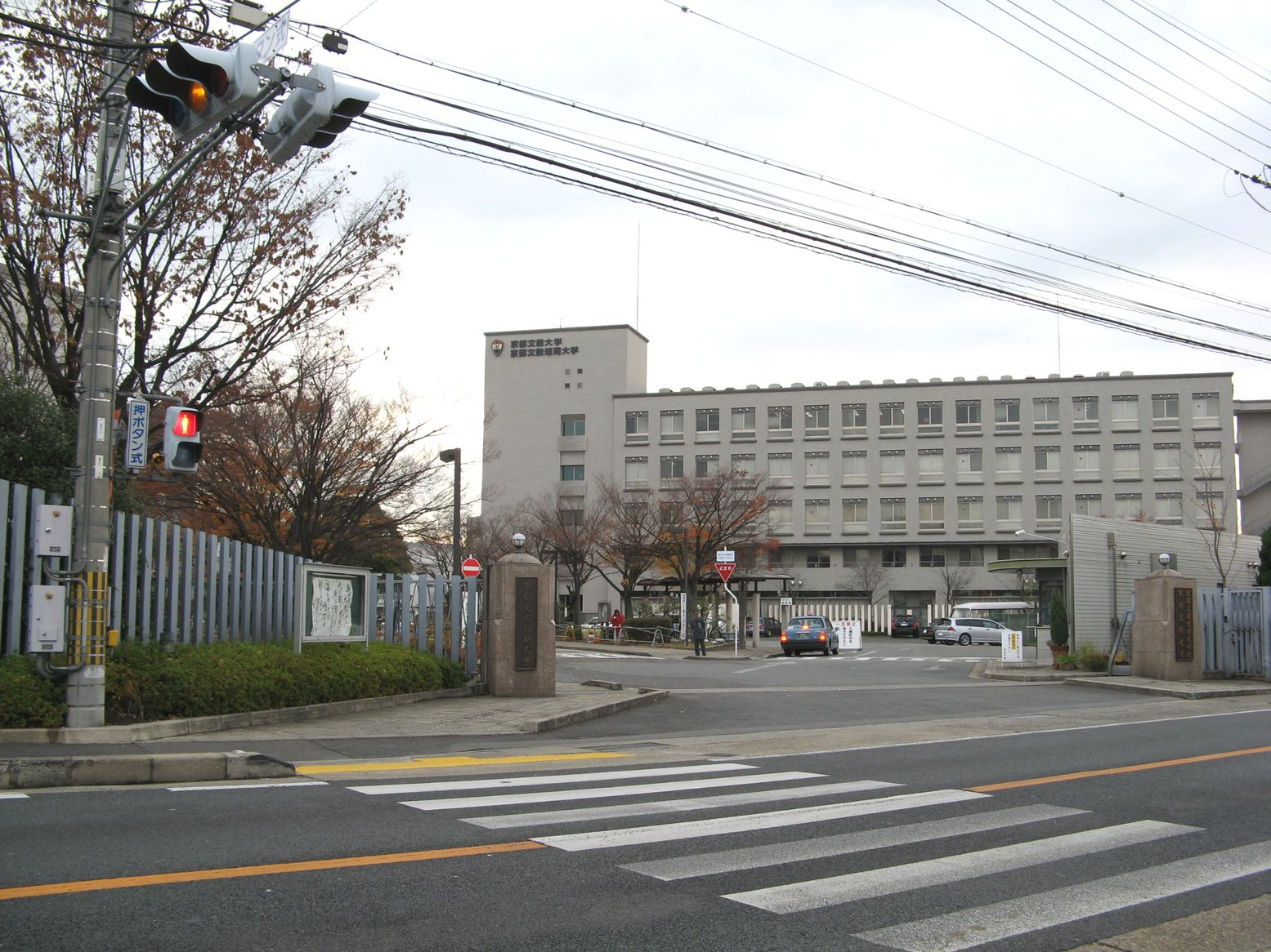 京都文教大学・京都文教短期大学 - 2007年12月 Bakkai撮影